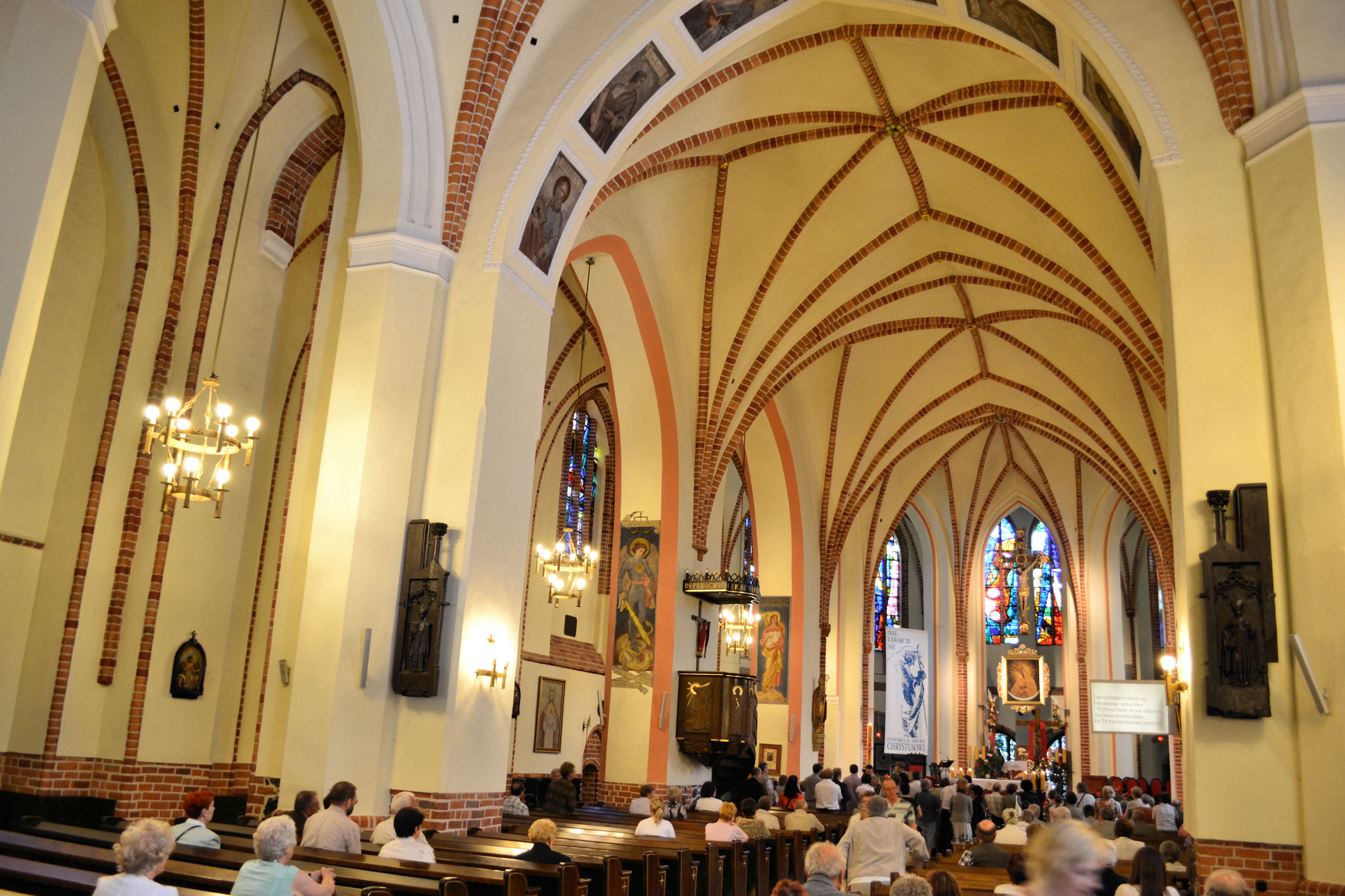 Kościół p.w. św. Jana w Stargardzie Szczecińskim